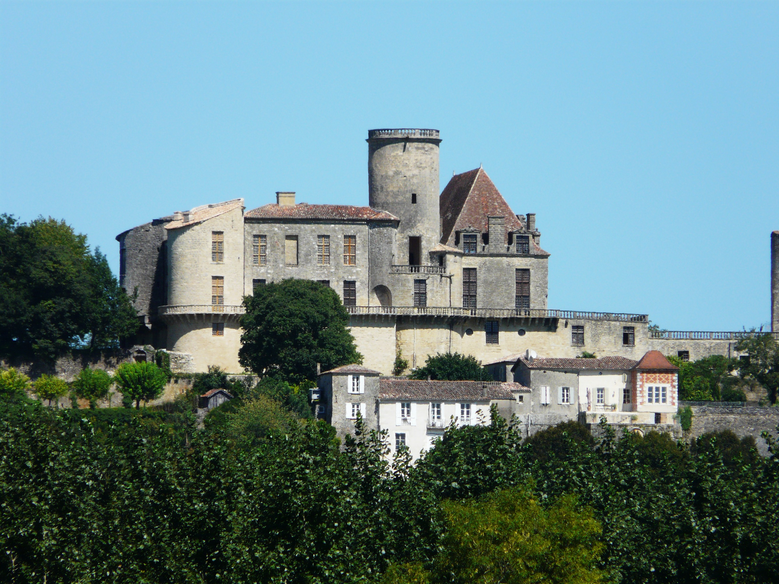 Le château de Duras (vu depuis le sud-ouest), Lot-et-Garonne, France Object location44° 40′ 37″ N, 0° 10′ 43″ E